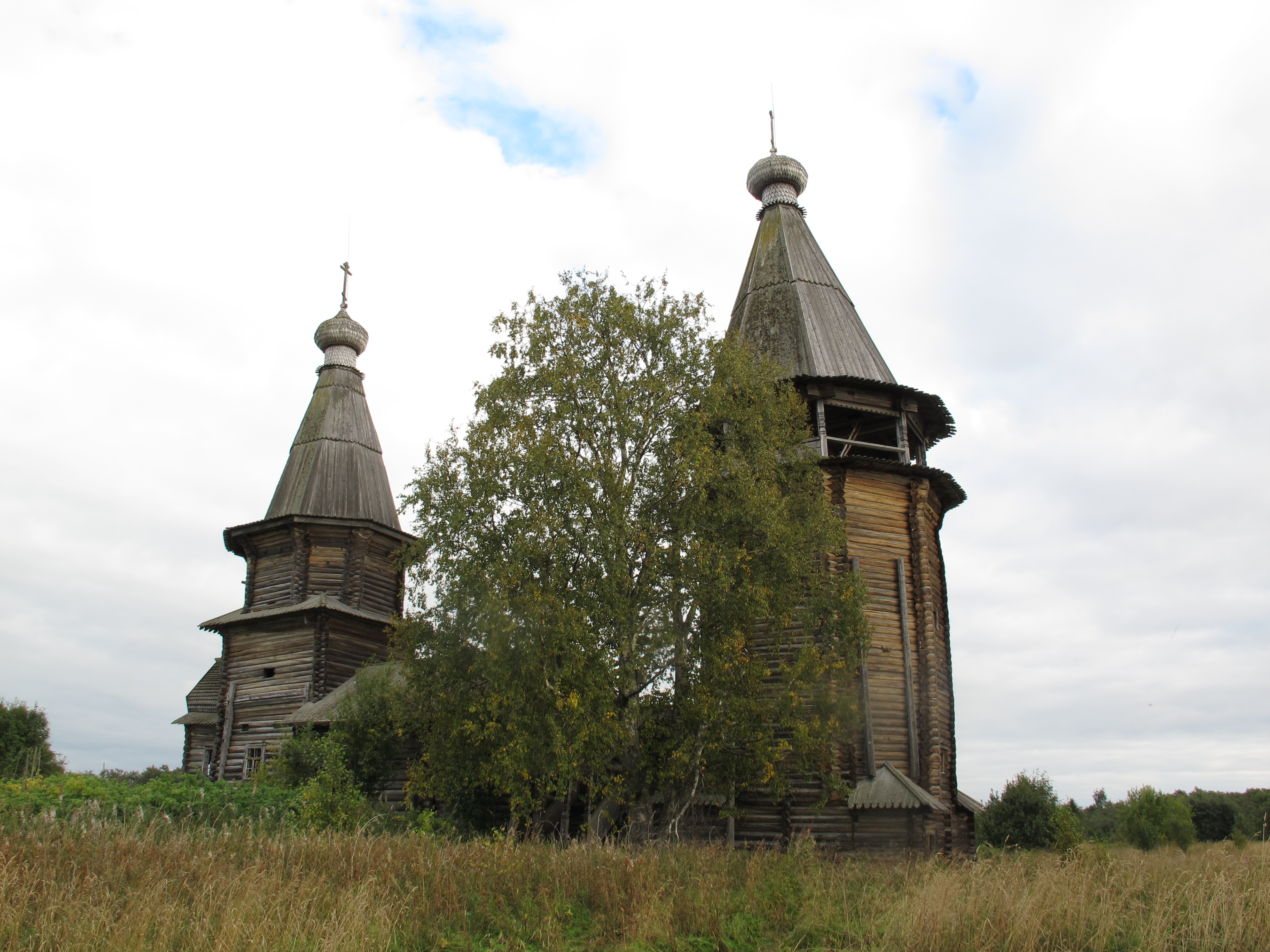 Год постройки: Между 1653 и 1656 Координаты: 62.24699,35.205943